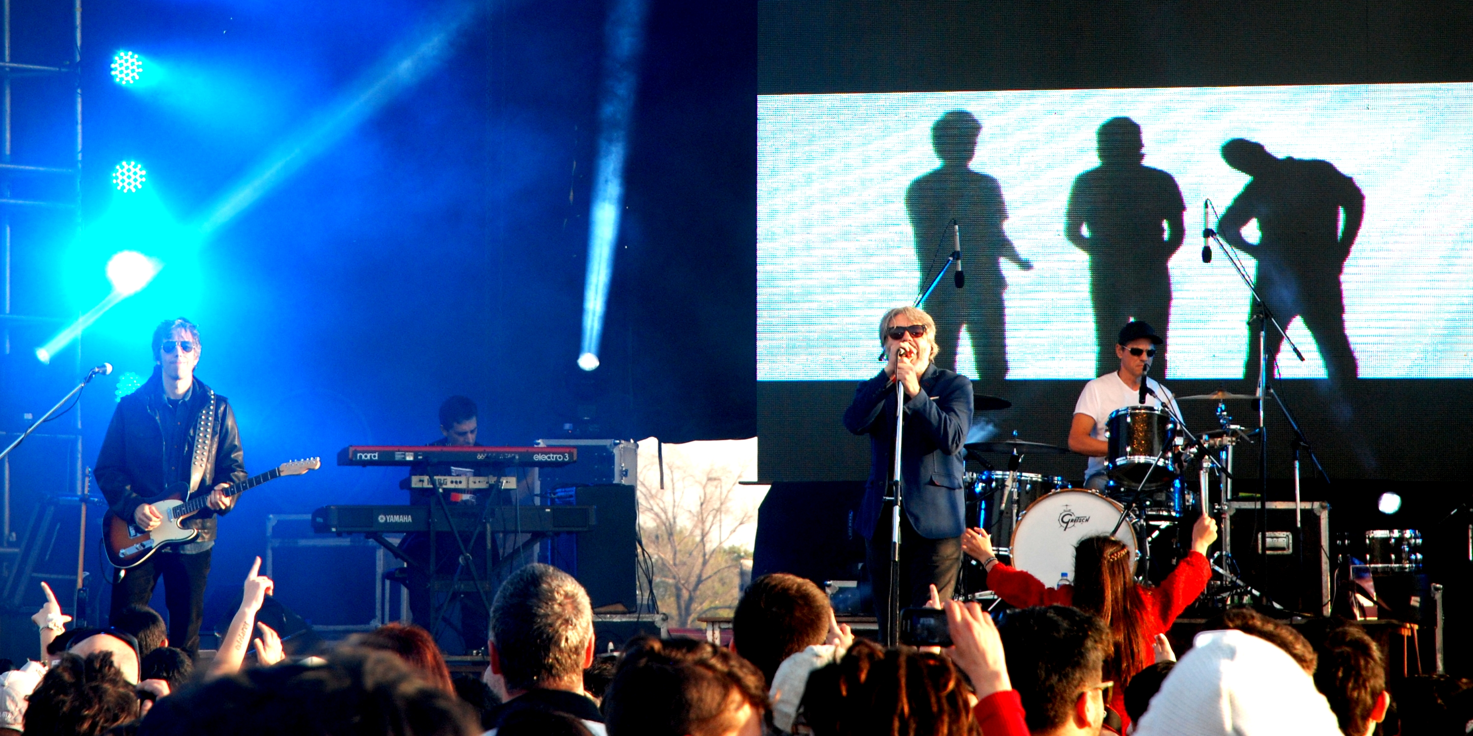 Estelares en 19 y 72, La Plata.